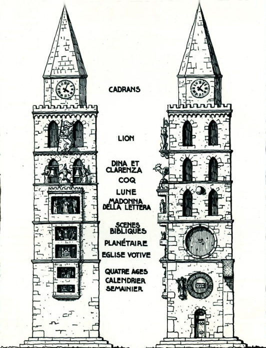 Schéma de l'horloge astronomique de la cathédrale de Messine (Sicile), réalisé par Théodore Ungerer